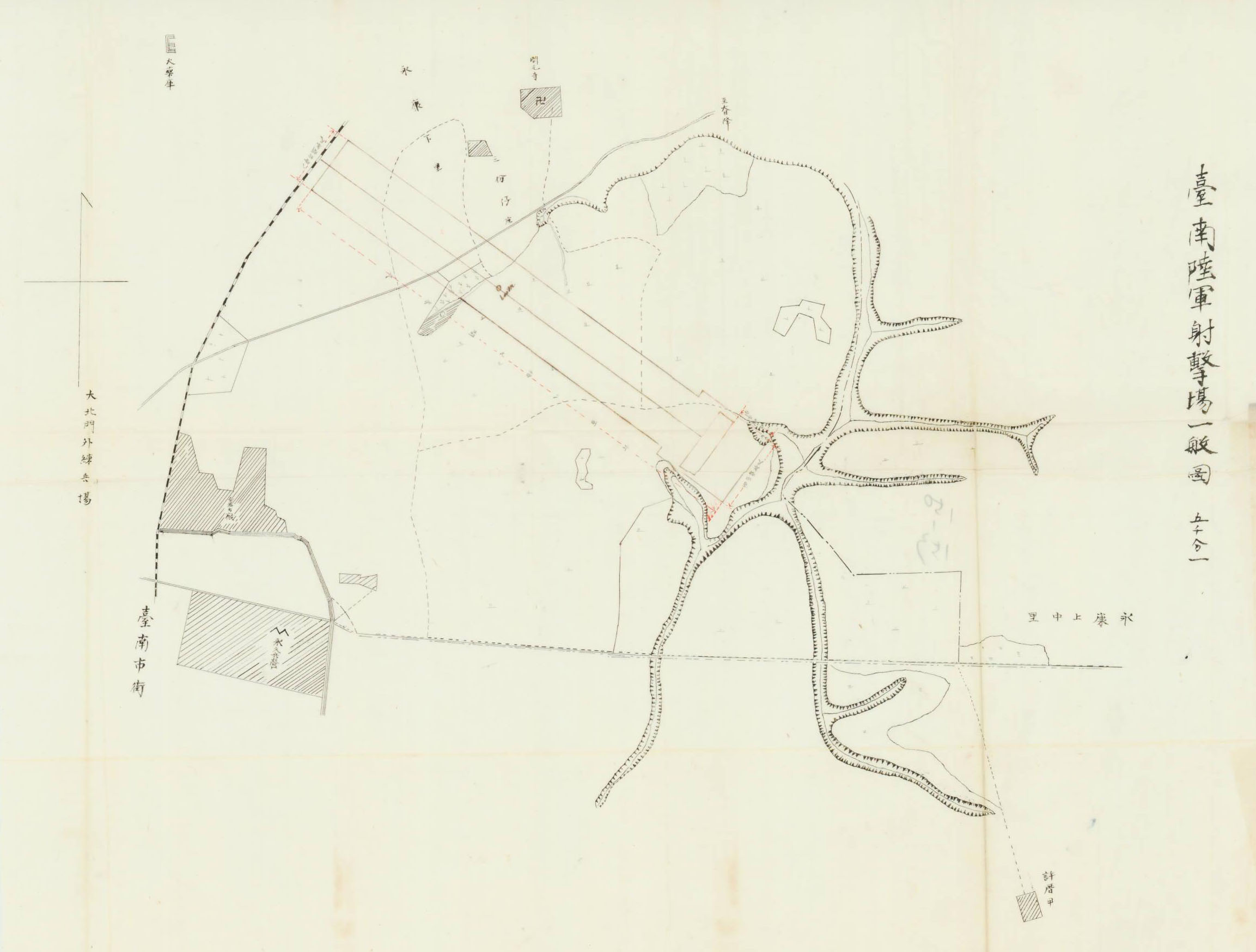 三分子日軍射擊場位於台南市北區，從街道紋理仍可看出當時的位置。